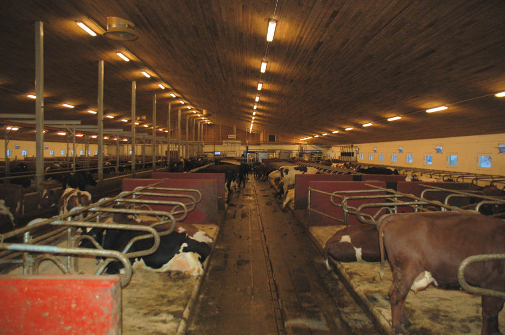 Liggebåsavdelingen i stort løsdriftfjøs